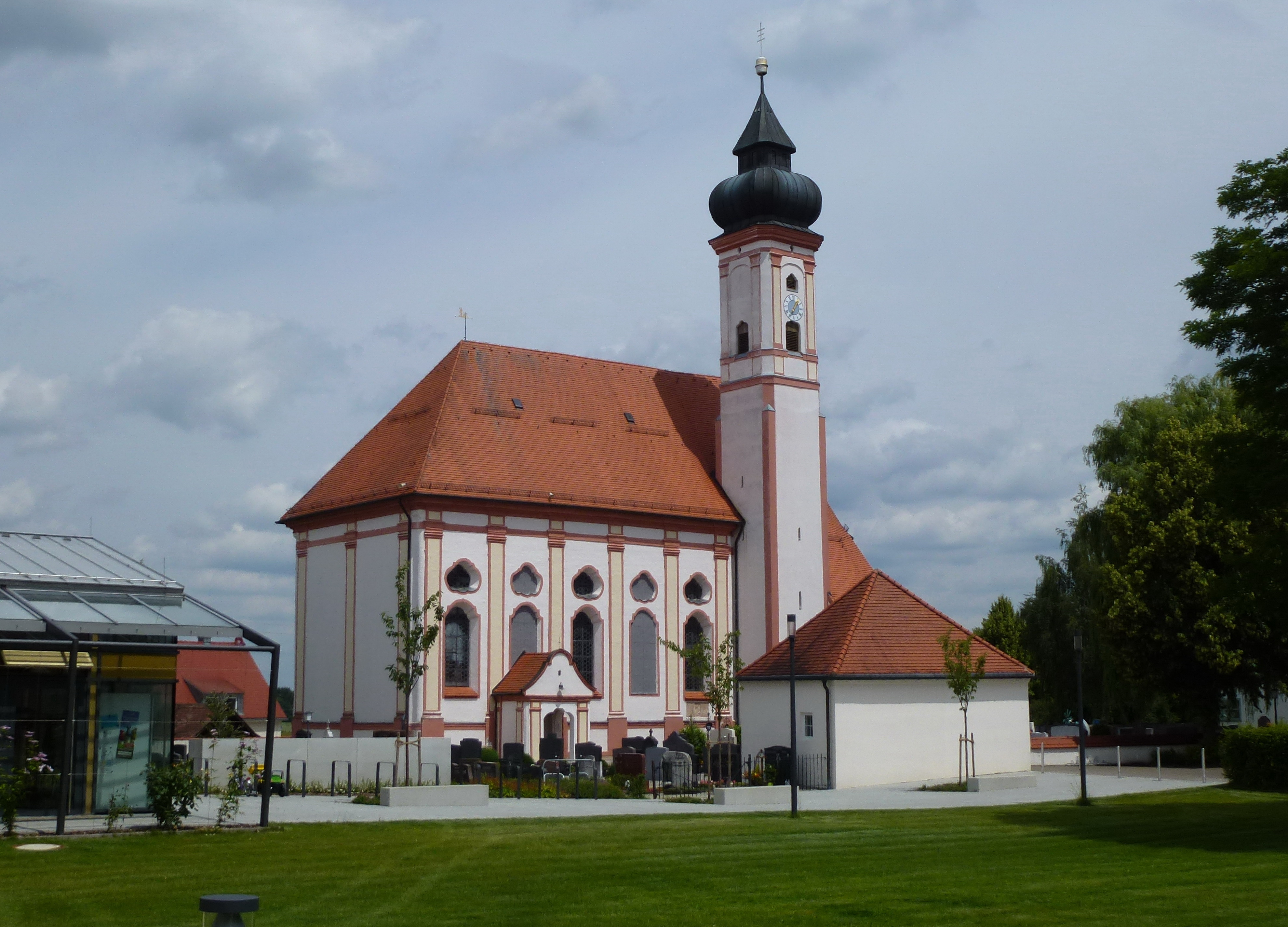 Vierkirchen, Gröbmaierstr. 8: Katholische Pfarrkirche St Jakobus. Erbaut 1763-1769 unter Pfarrer Johann Georg Gröbmaier (1703 - 1779). Planung: Baumeister Anton Glonner aus Dachau. Ansicht aus SSW